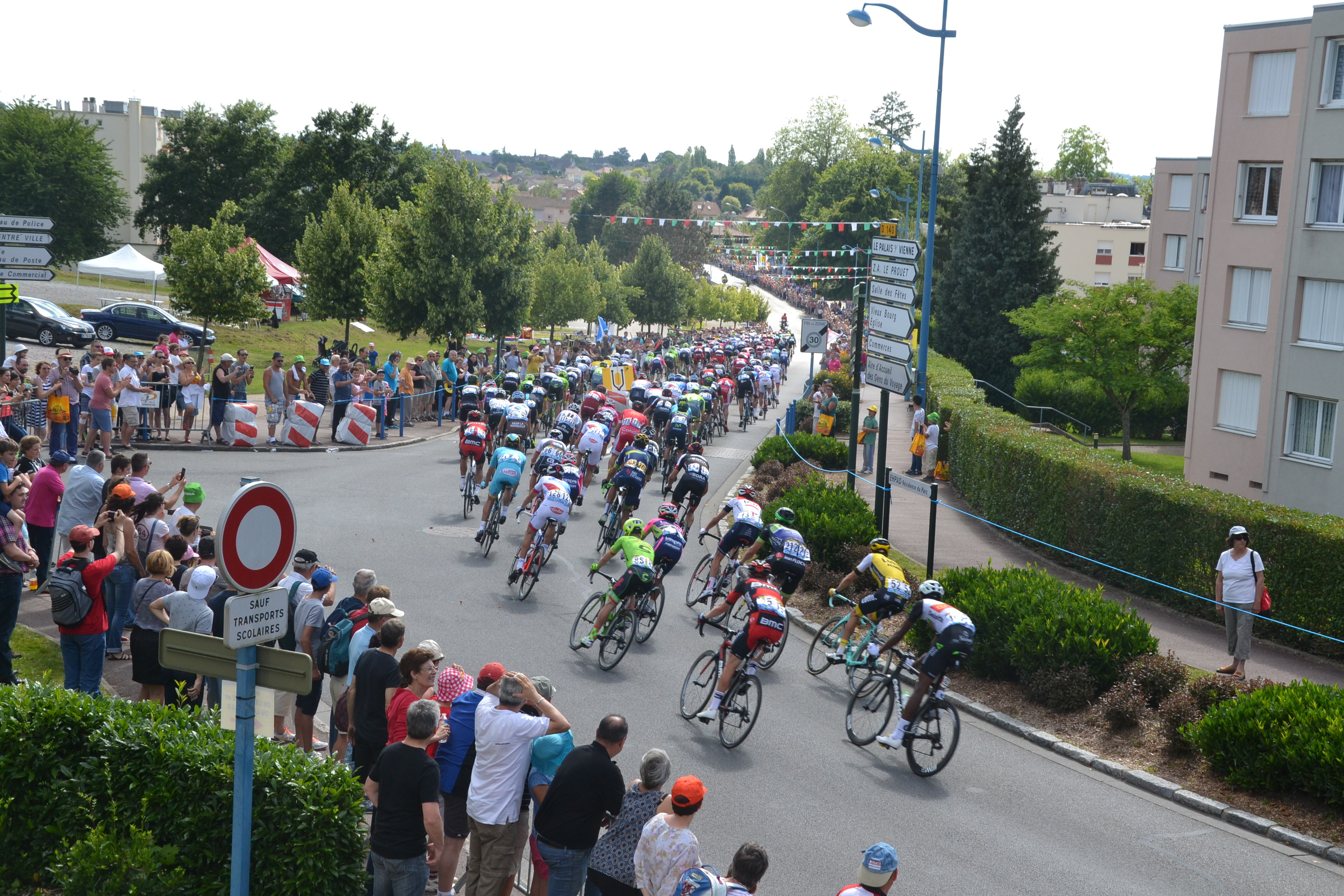 Passage du Tour de France 2016 à Panazol (Haute-Vienne, France), 4e étape.